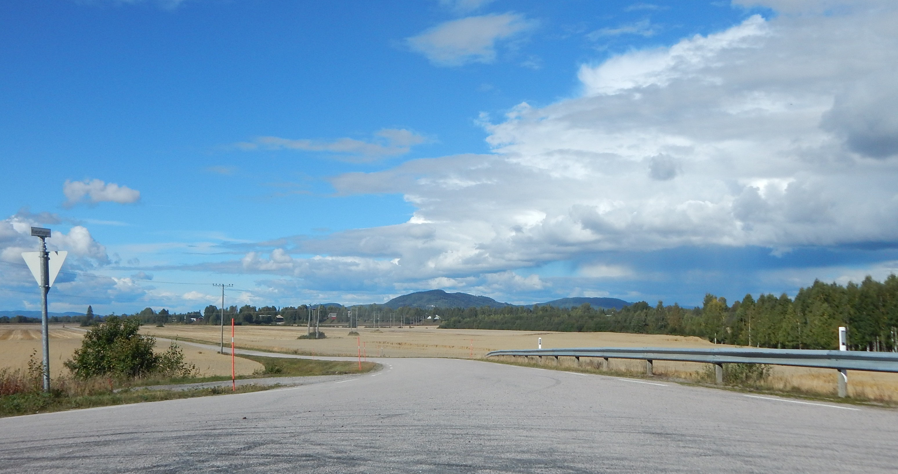 Sørenden av Kvesetvegen (fylkesvei 437) sett fra Hofvegen (fylkesvei 434)